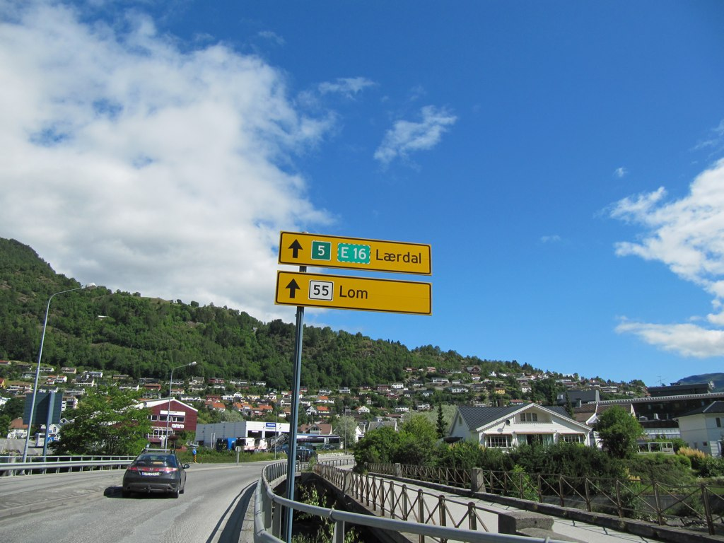 Onderweg